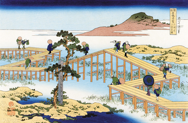 三河の八ツ橋の古図(みかわのやつはしのこず)